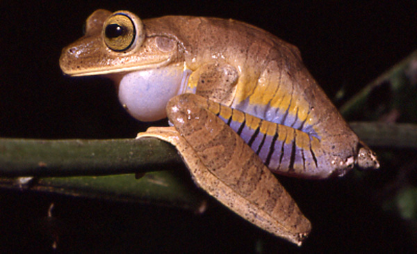 Bokermannohyla hylax